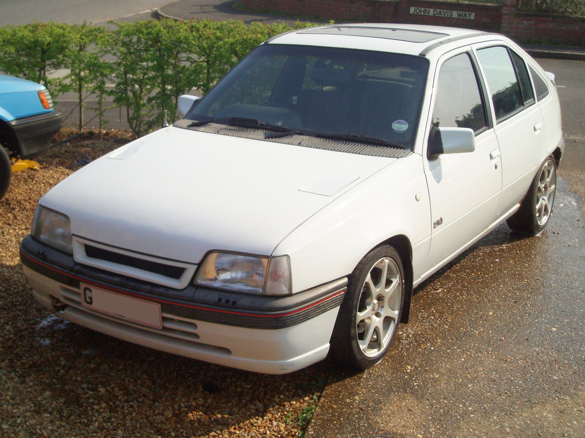 1989 Vauxhall Astra Mk 2 SRi 5-door.